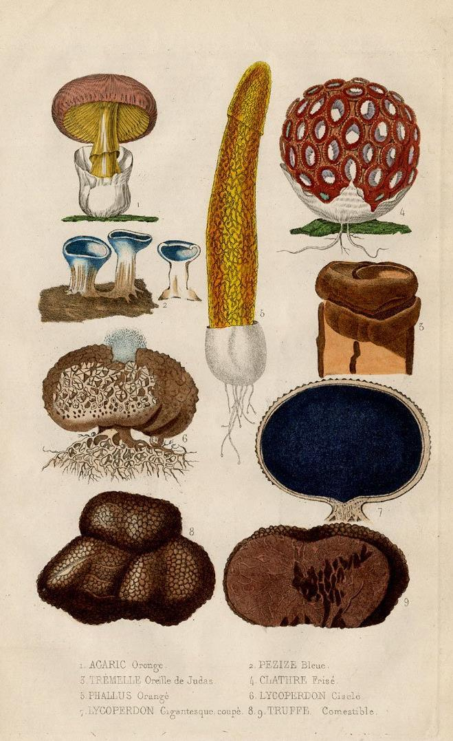 Pierre Auguste Joseph Drapiez: Biographie Nationale, illusztráció